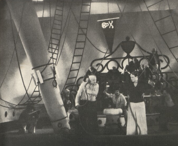 Pudr a benzín (scéna z filmu)